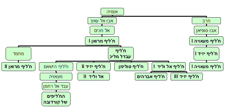 שושלת היוחסין של בית אמיה